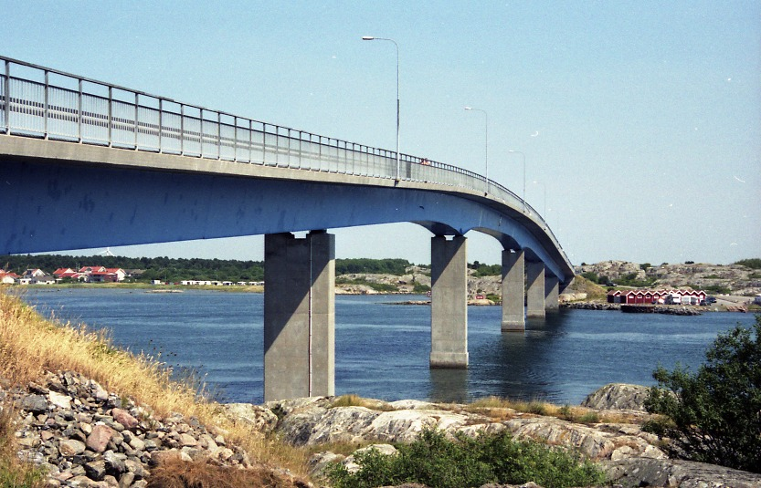 Fotöbron sedd från Söö